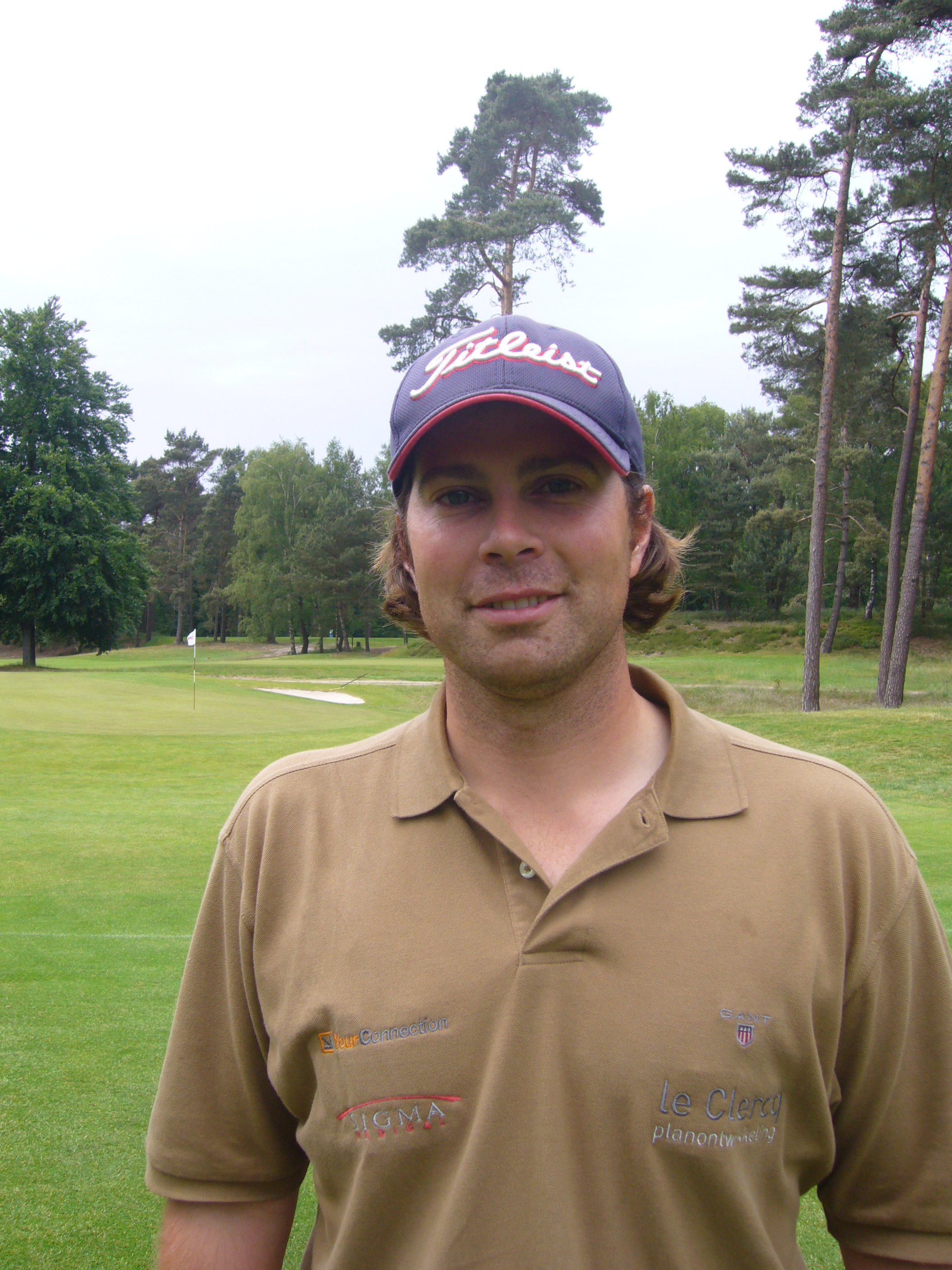 Hiddo Uhlenbeck, Nederlands golfprofessional